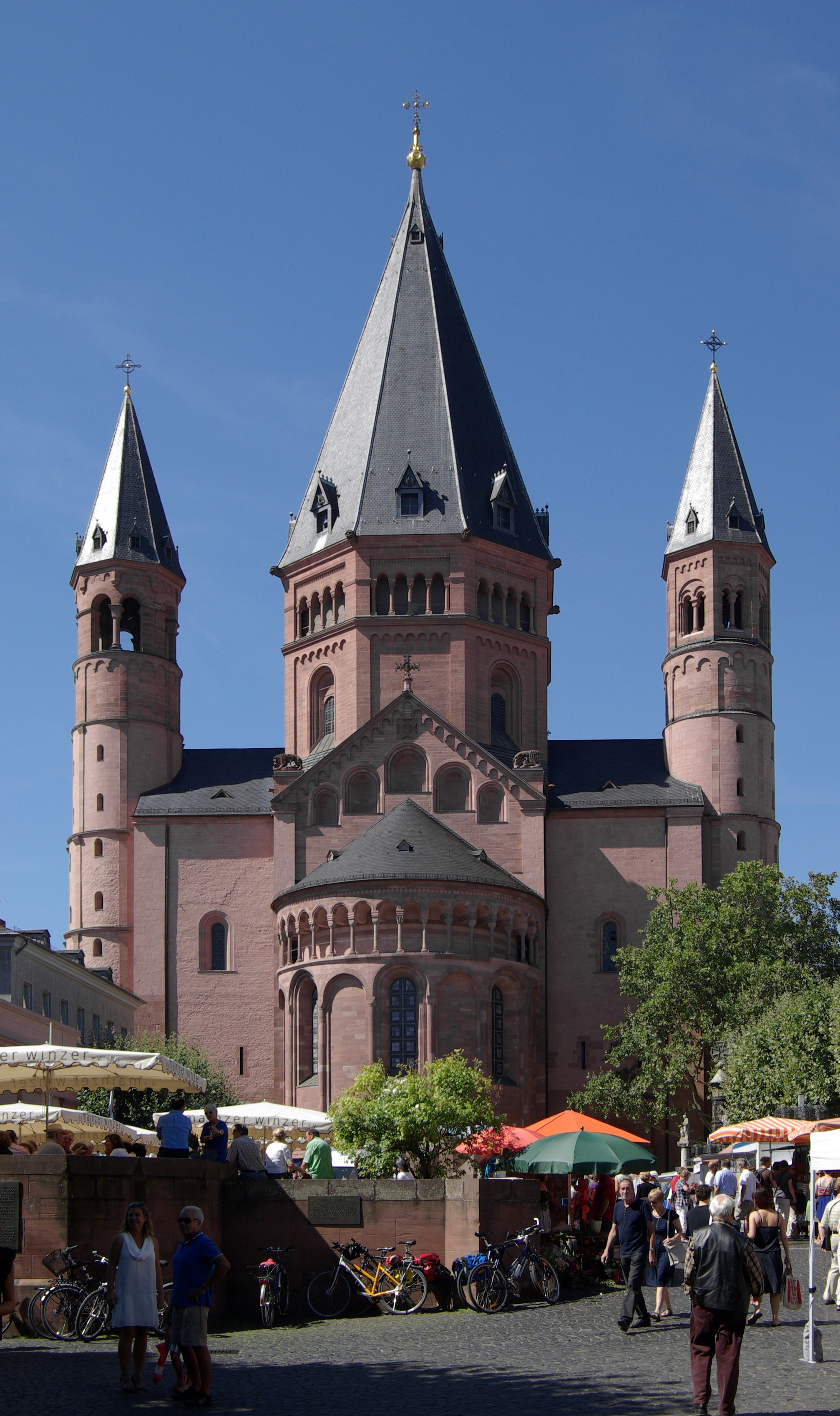 Mainz, Dom von Osten